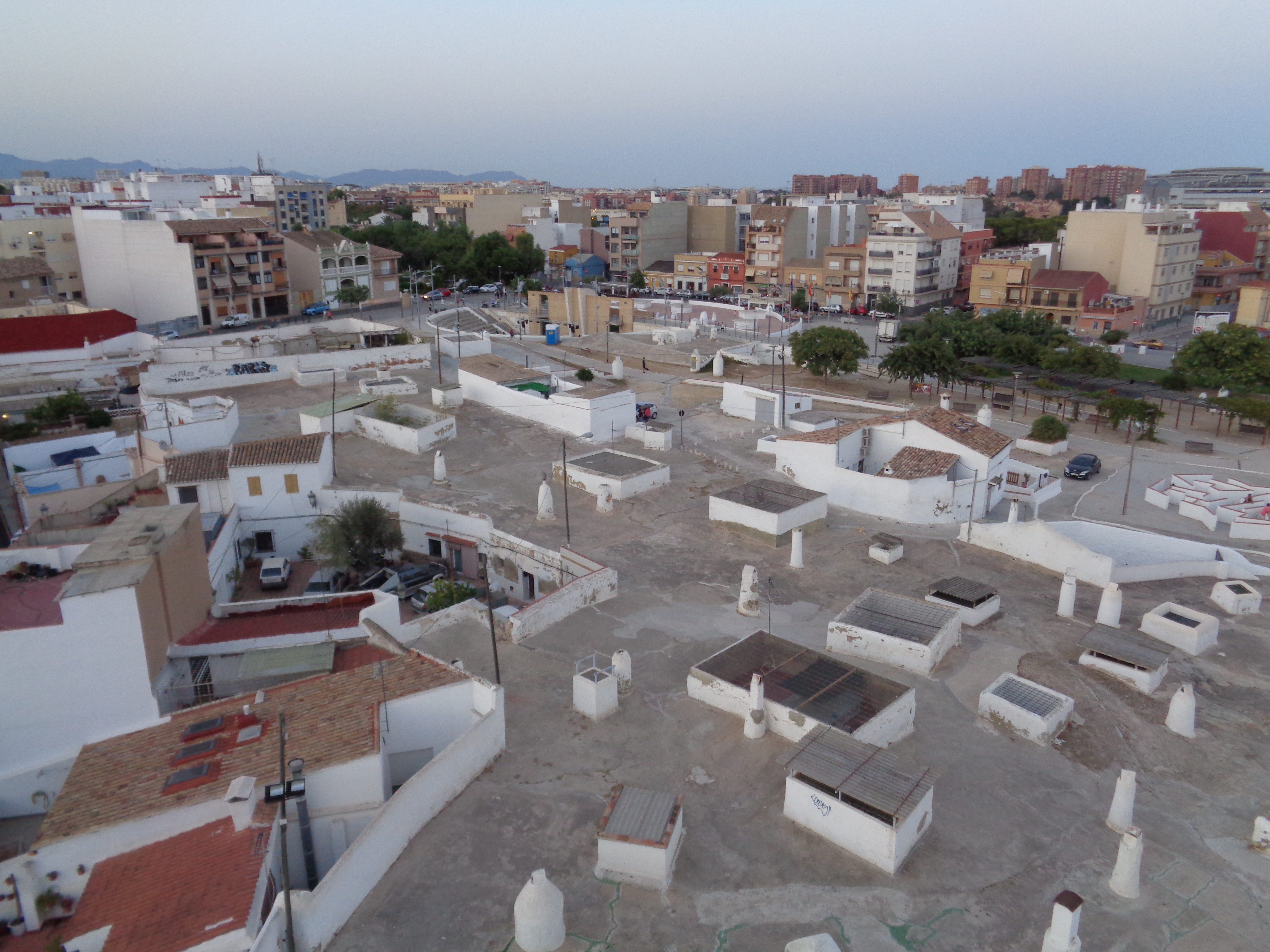 Vistes des de la terrassa de la torre de Paterna.